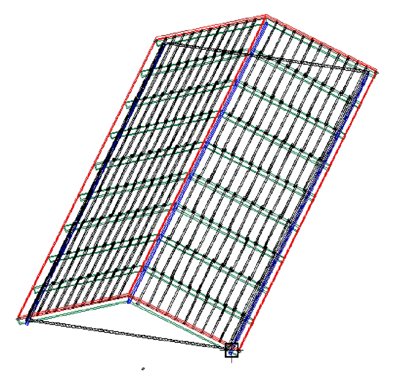 Dachkonstruktion mit Koppelpfetten. grün: Binder schwarz: Koppelträger bzw. Koppelpfetten